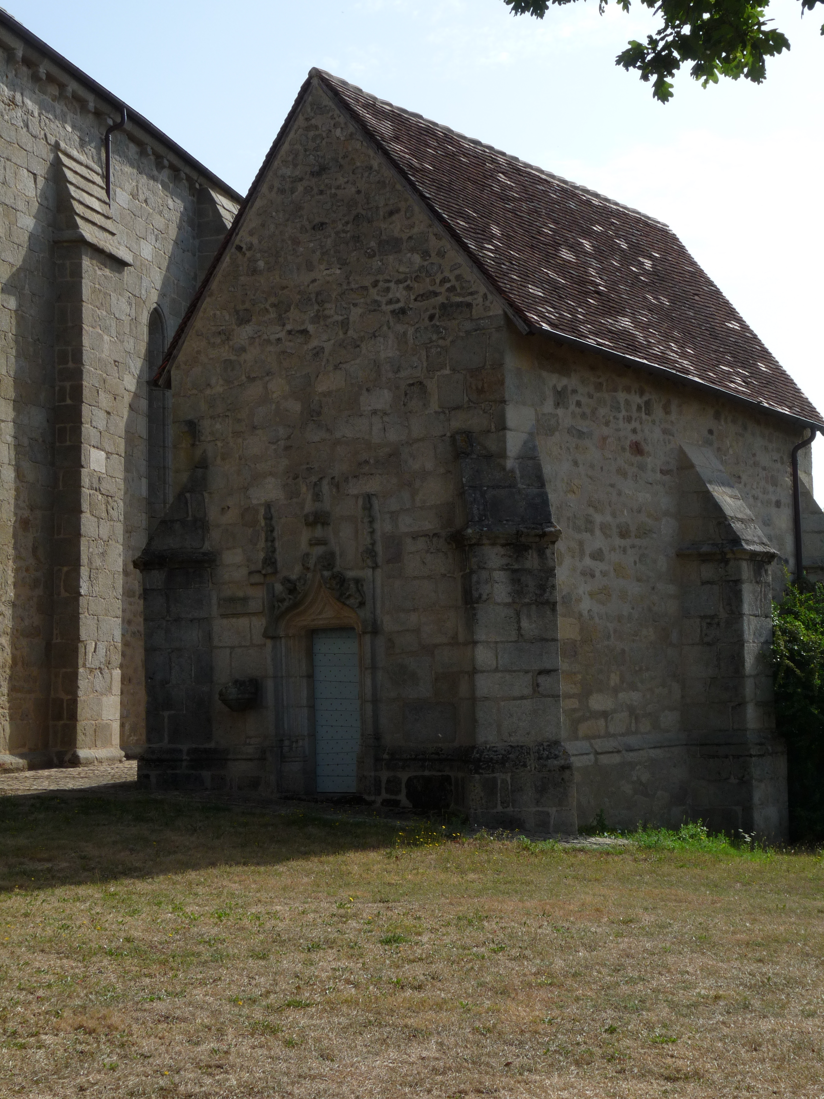 Chapelle Saint Fiacre à côté de la commanderie à Paulhac (Creuse)